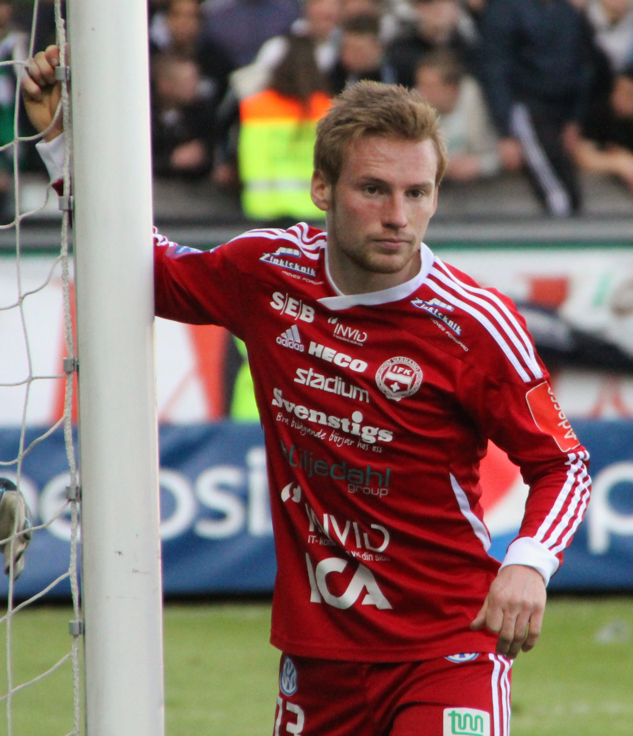 IFK Värnamos Tobias Englund.